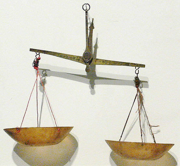 Kleine Balkenwaage, so genannte Samenwaage; Messing, Schalen aus Horn; Süddeutschland 1. Drittel 19. Jh. Landesmuseum Württemberg (Außenstelle Museum für Volkskultur in Württemberg, Waldenbuch) E.6.2., Inv. Nr. L-VK 1985/814-29